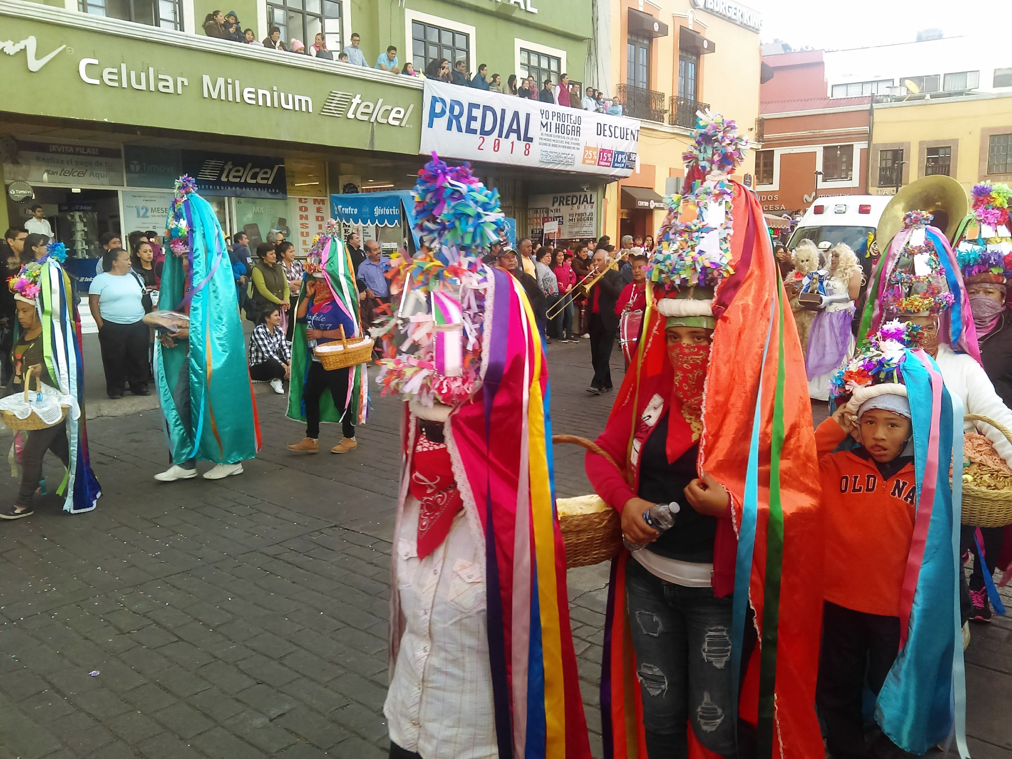 Desfile "Magia de los Carnavales de Hidalgo" en Pachuca de Soto, México (2017). Representación del Municipio de Tecozautla.